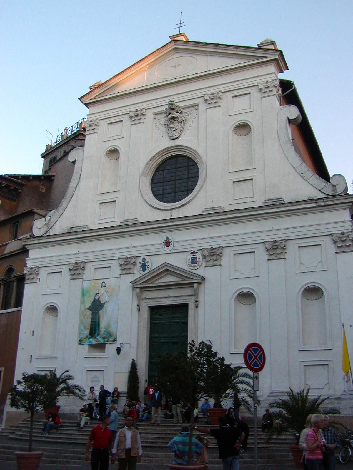 Santo Spirito in Sassia